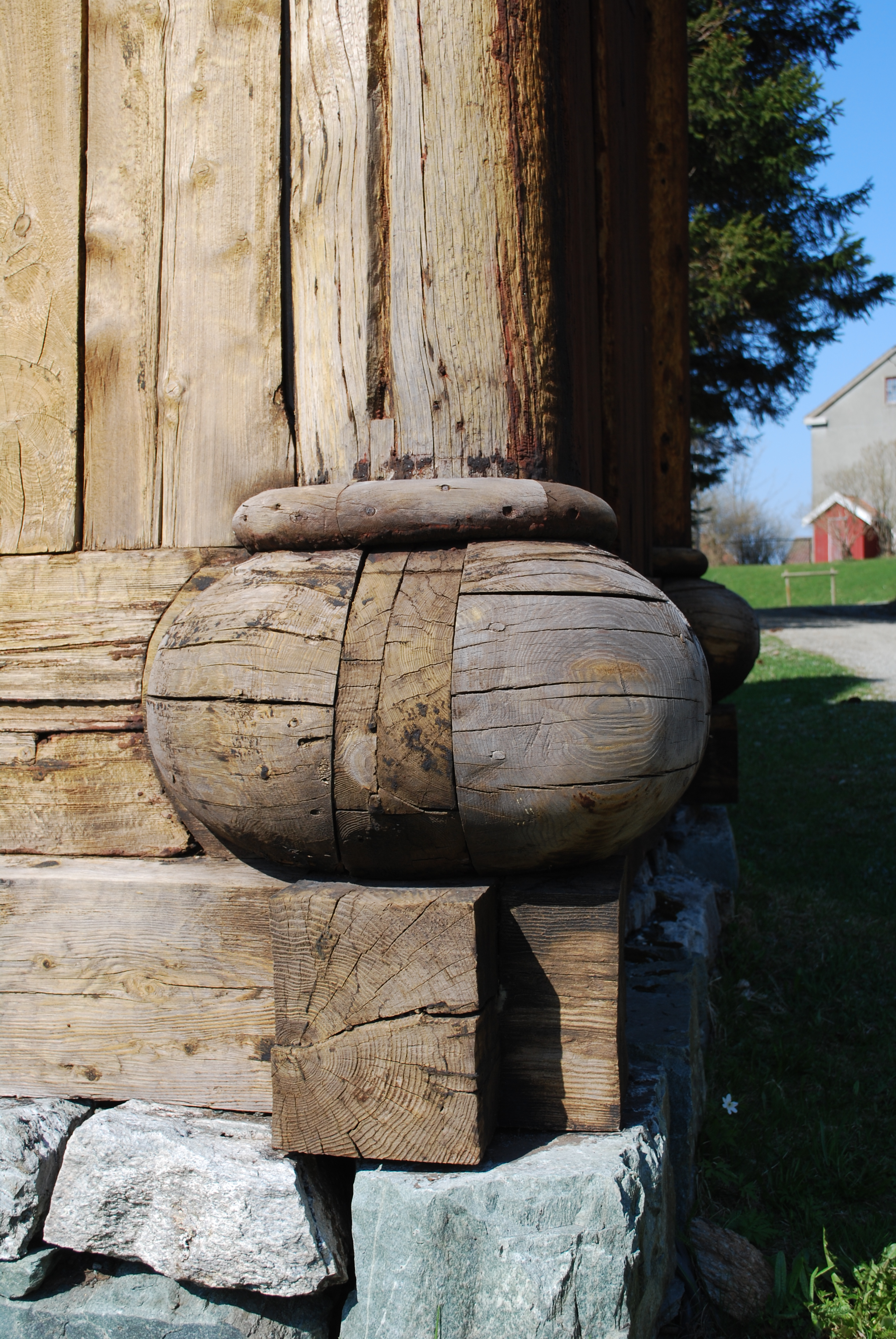 Detaljer fra Haltdalen stavkirke. Grunnmur, bæresville og selve staven (hjørnestav) sammen med panel.